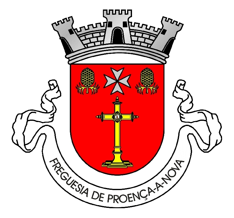 Simbolo da Junta de Freguesia de Proença-a-Nova de autoria do Prof. Paulo Antunes Santiago